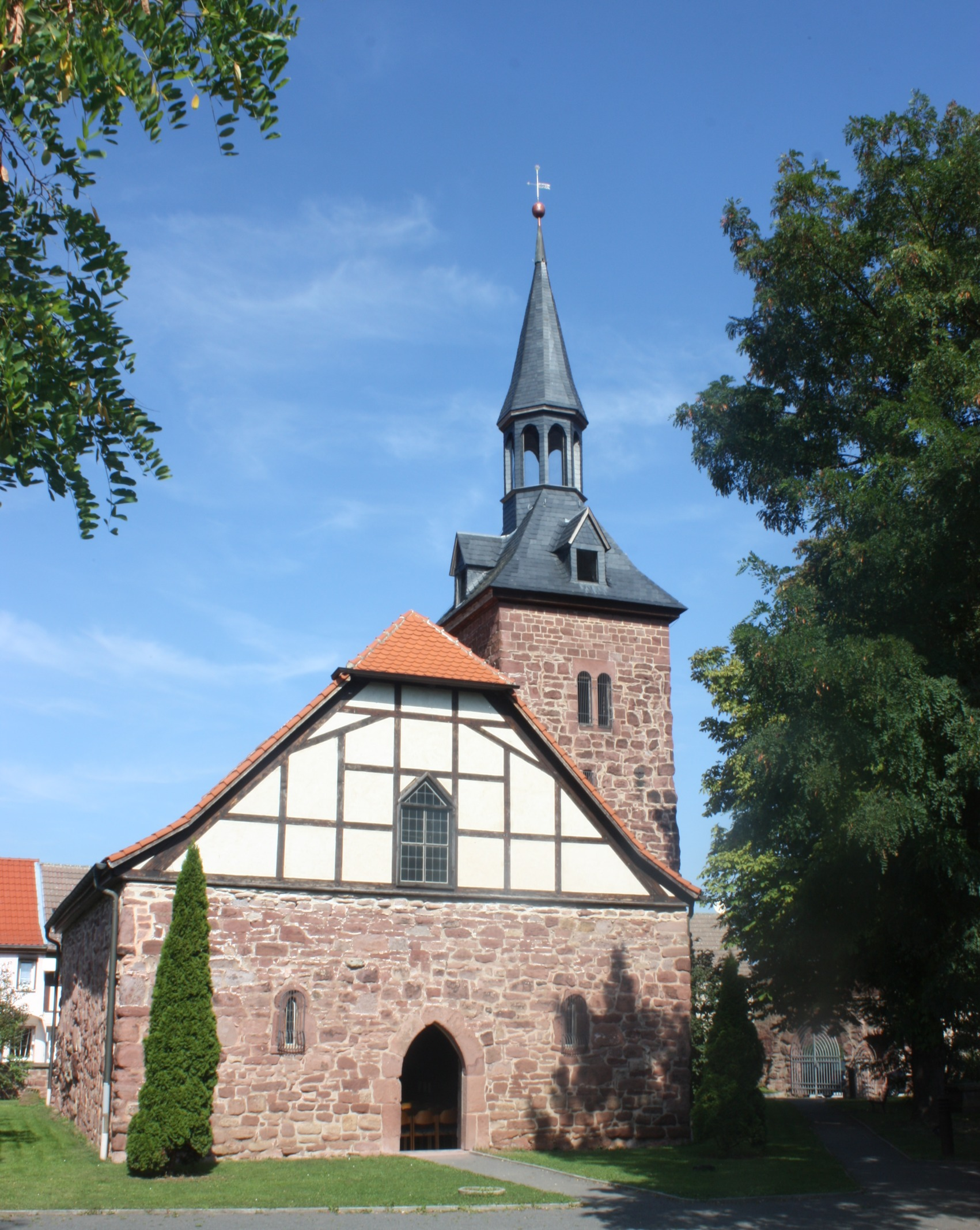 Kelbra, Kirche St. Martini (an Kreuzung Breite Straße/Martinistraße)